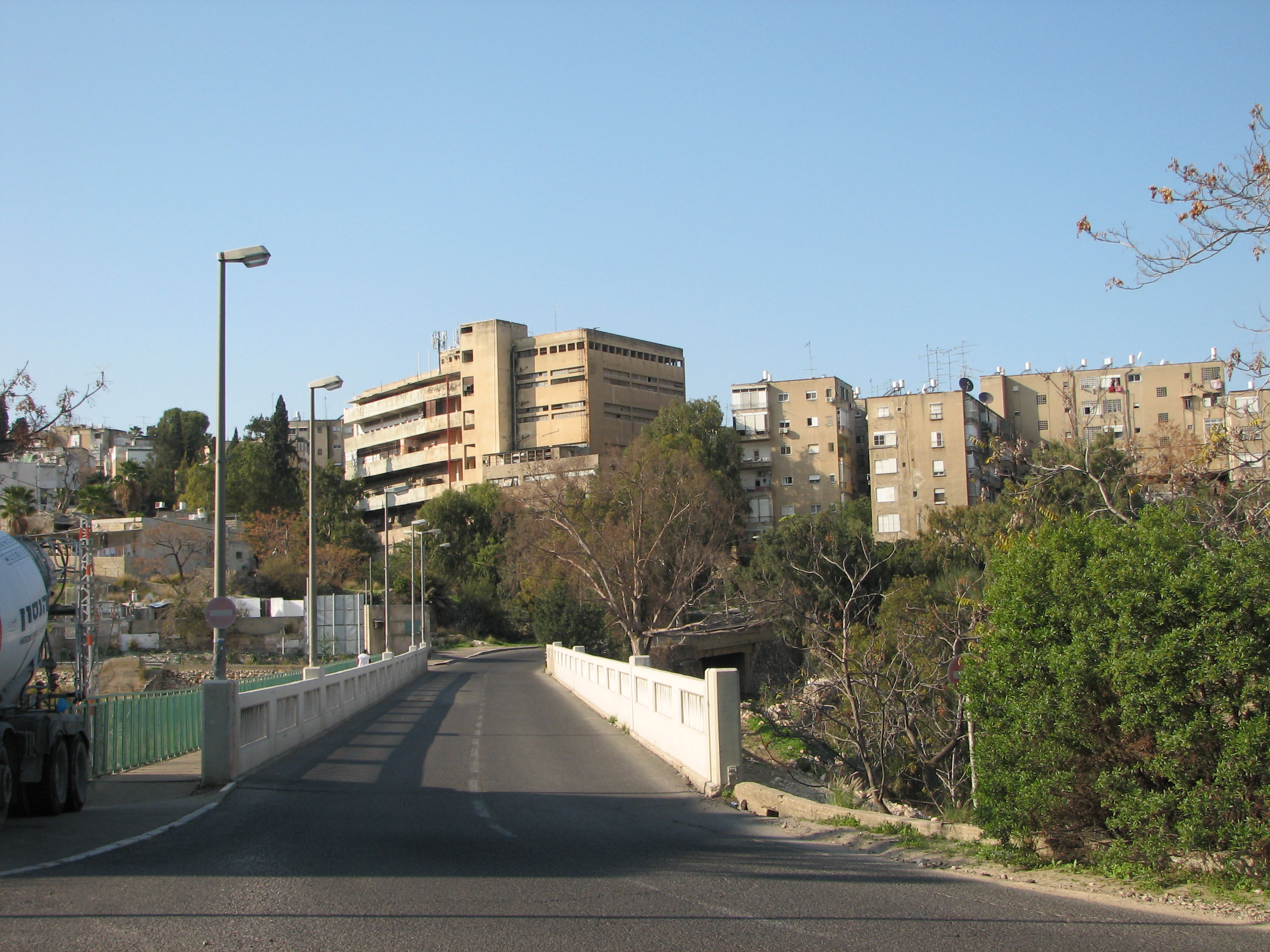 Rushmia bridge, Haifa, Israel גשר רושמיה בחיפה, מעל ואדי רושמיה. שכונת חליסה. בקרב על חיפה במלחמת העצמאות התחוללו קרבות כבדים על בית הנג'אדה בקרבתו. לאחר המלחמה הוחלף שמו לגשר הגיבורים ושם הואדי תחתיו - לנחל הגיבורים. בסמוך לגשר - אנדרטה ללוחמי גדוד 22 שנפלו במלחמת העצמאות